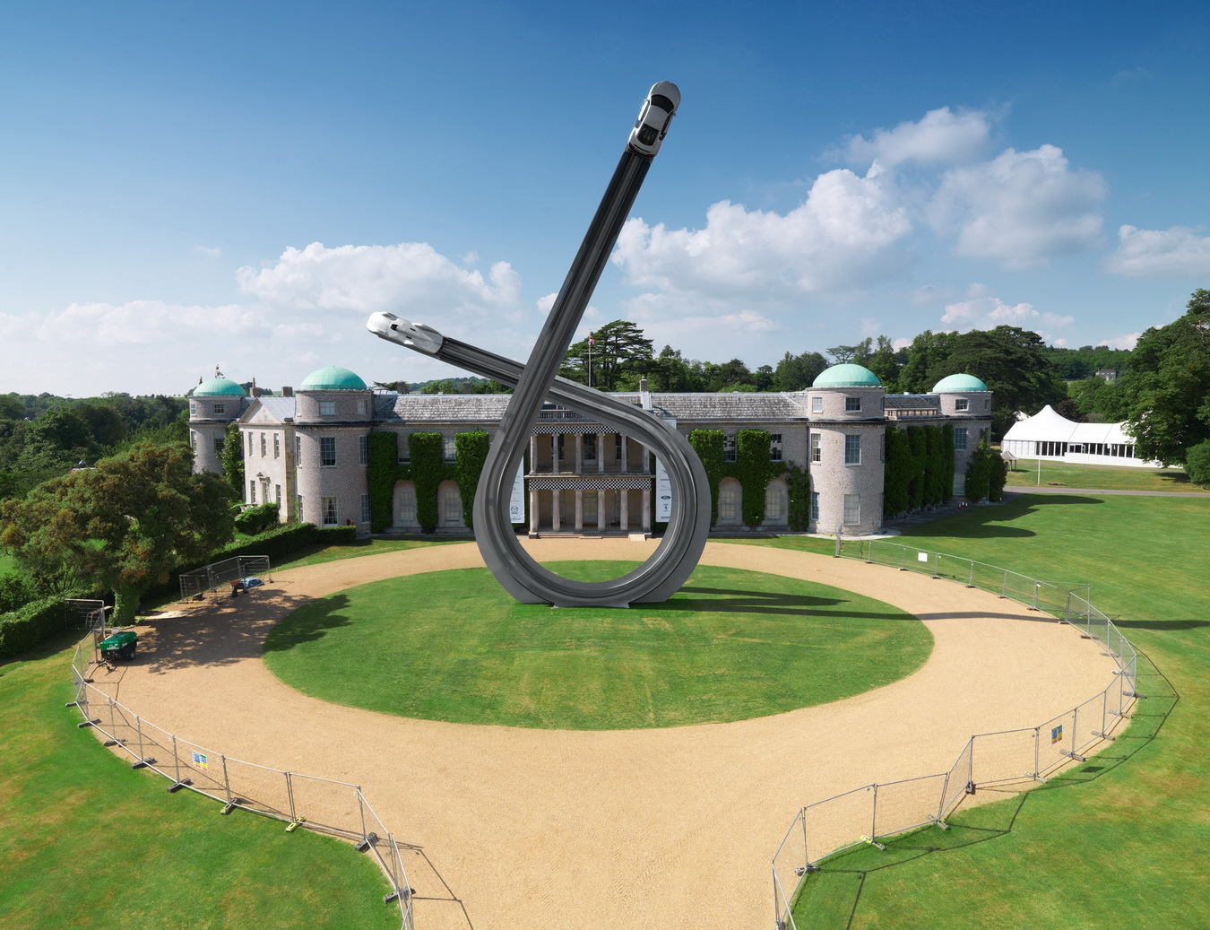 Audi-Goodwood